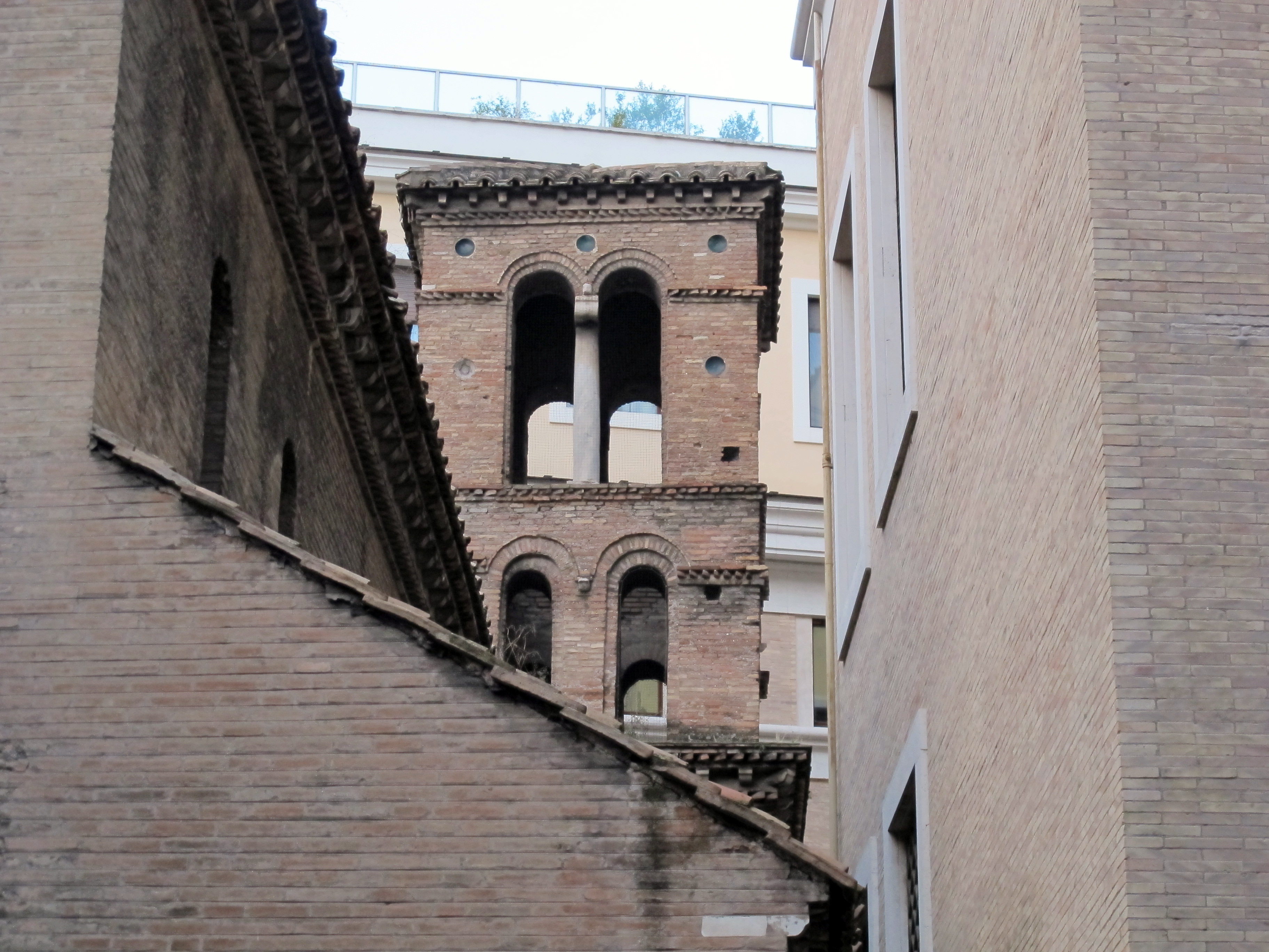 Roma, vedi titolo